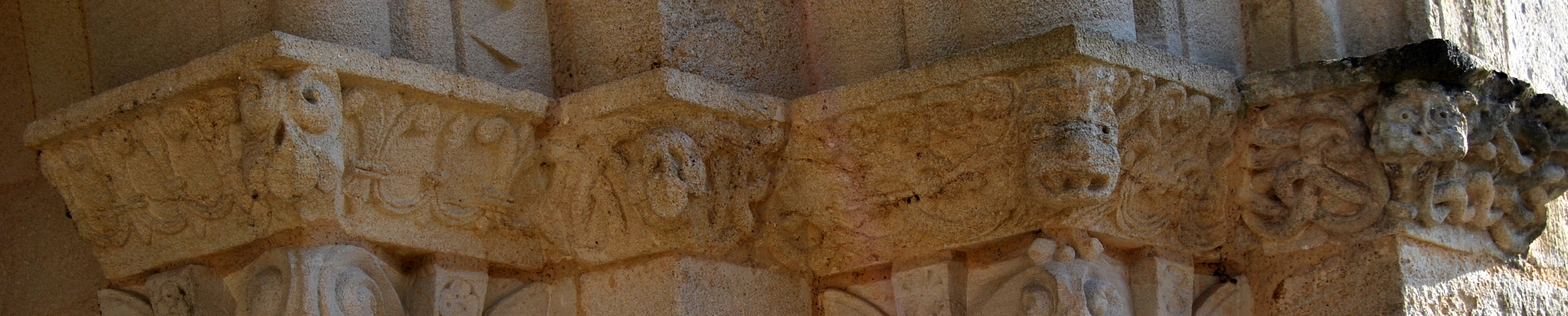 Église Saint-Martin d'Arbis portail sud